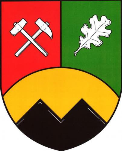 Svatá, okres Beroun, znak